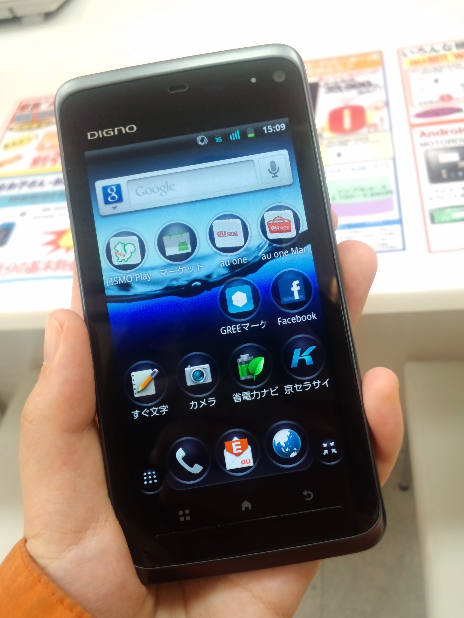 京セラ製のau向けWiMAX+搭載スマートフォン「ISW11K」です。